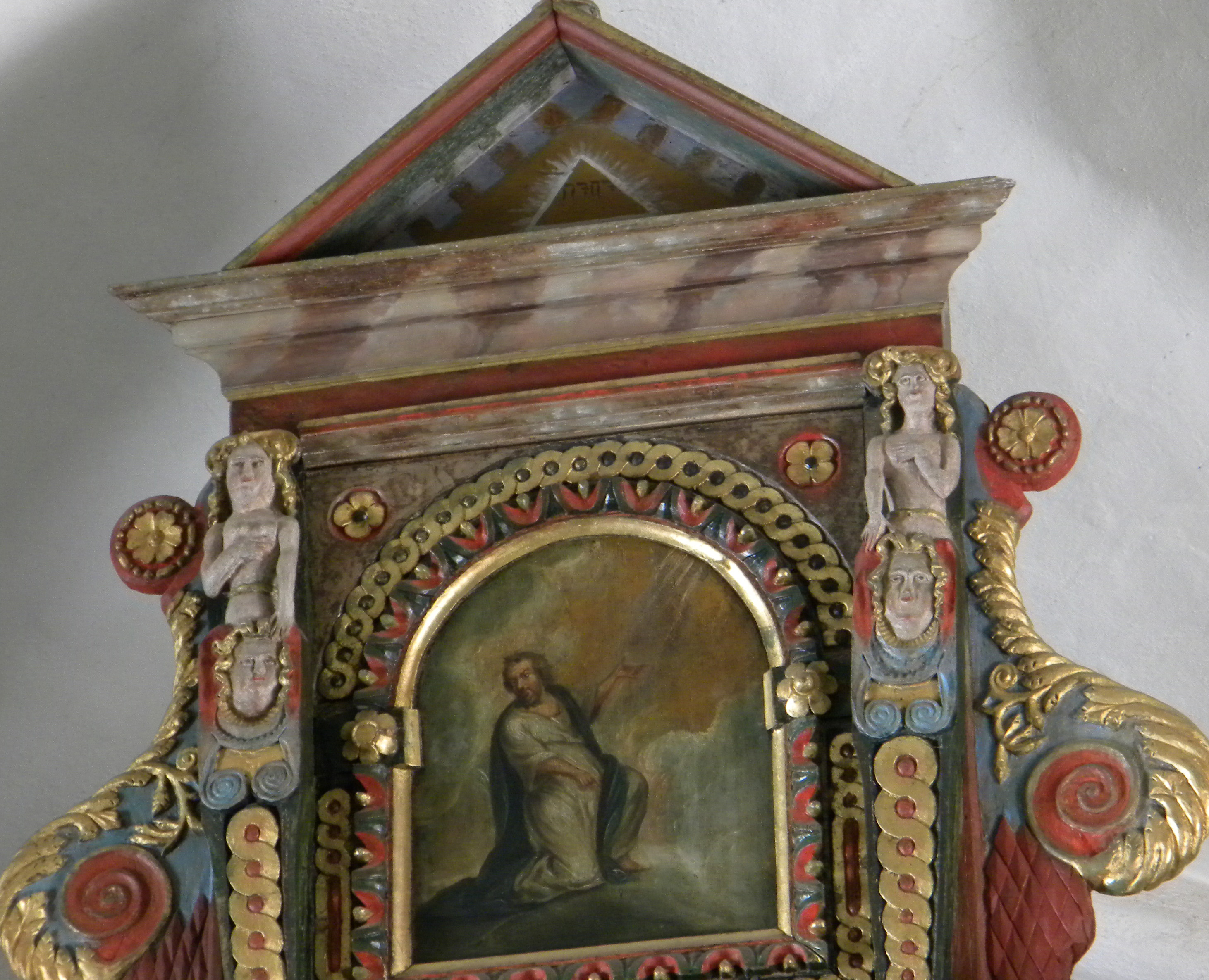 Altarkrön med tetragrammet JHWH i Stävie kyrka